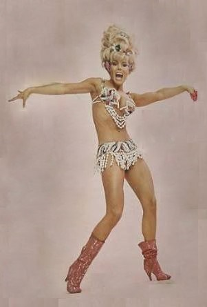 Nélida Lobato, actriz y vedette argentina